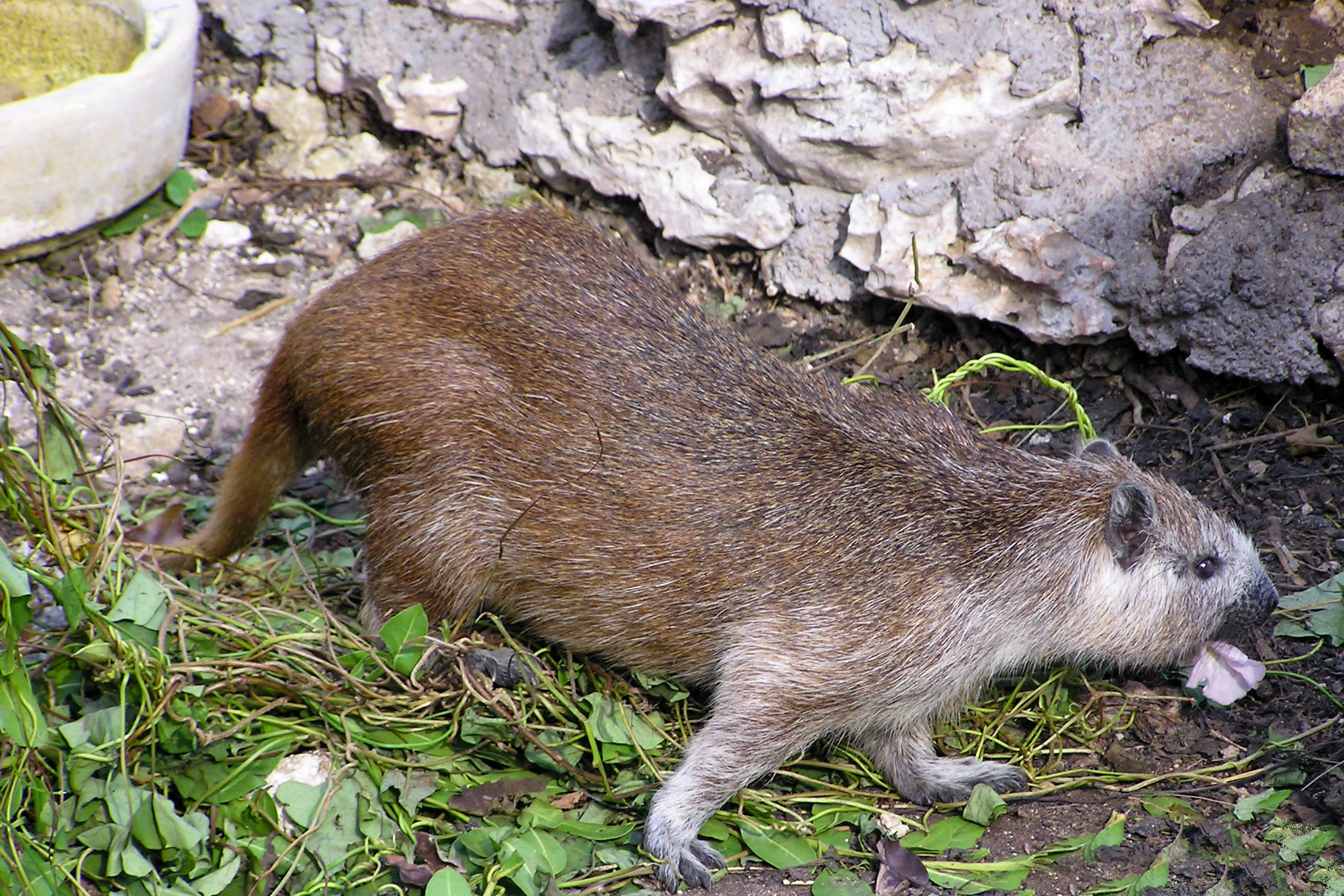 Rat poilu ou Hutia cubain (Capromys pilorides) - Parc zoologique du lac del Tesoro - Province de Matanzas - Cuba